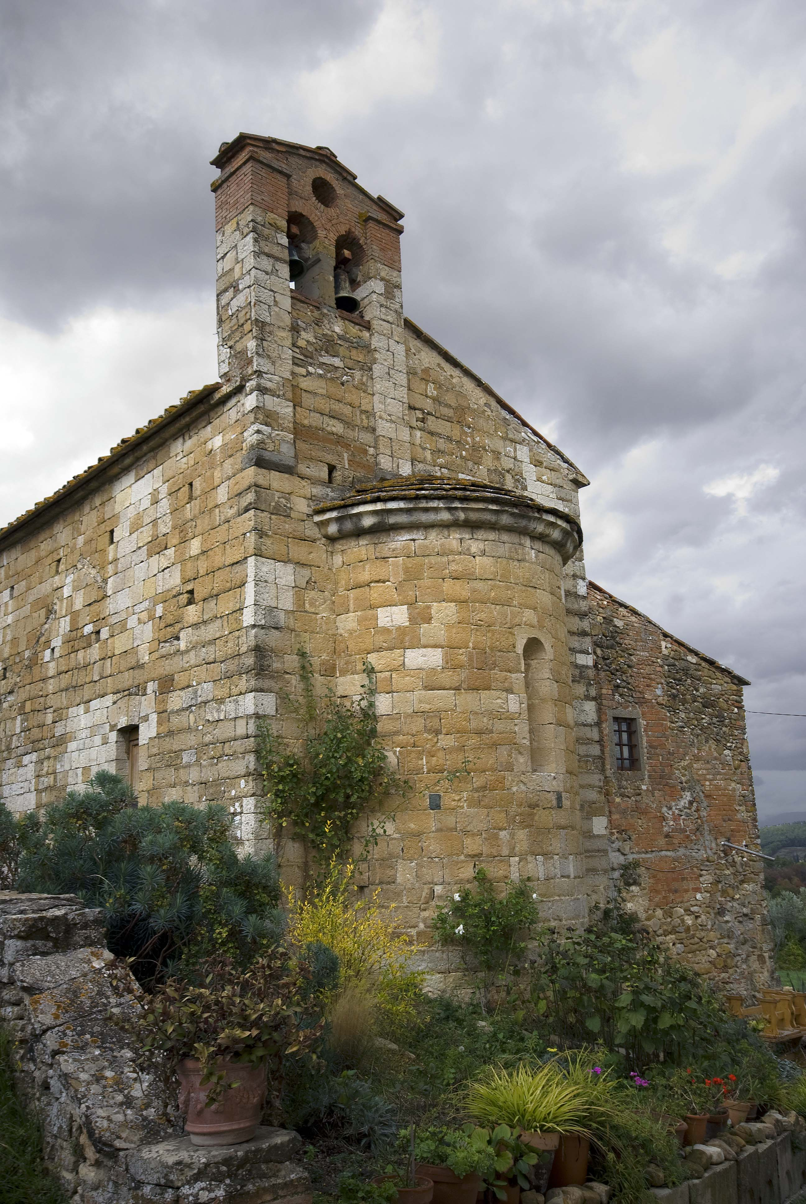 chiesa di sant'andrea a luiano - Abside - San Casciano in Val di Pesa